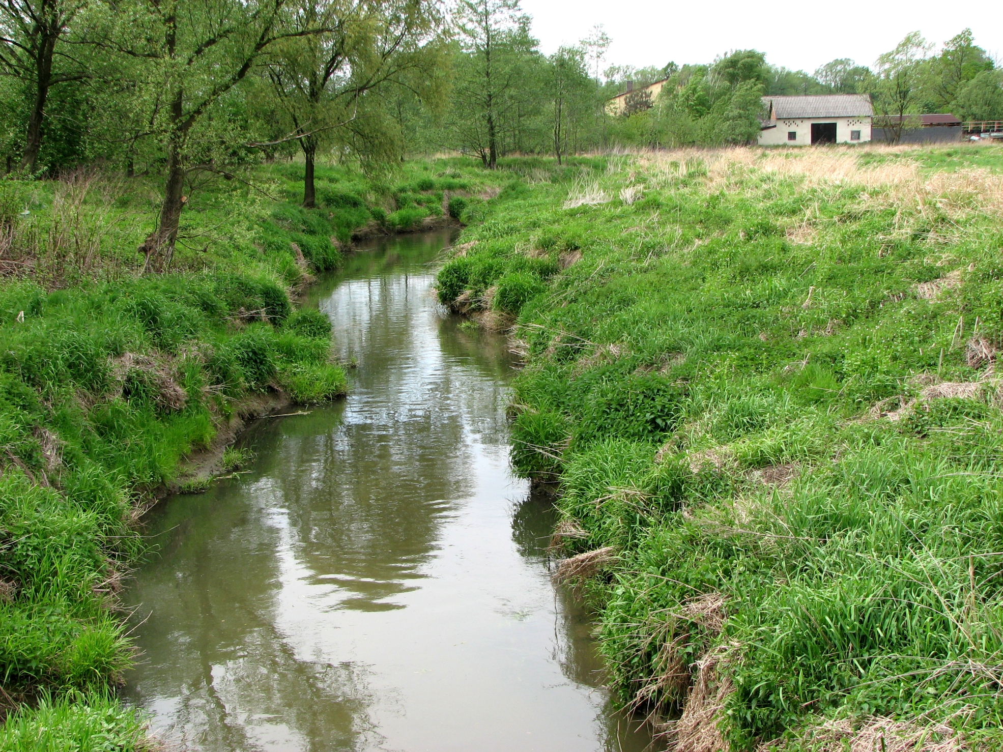 Piotrówka, river, Poland